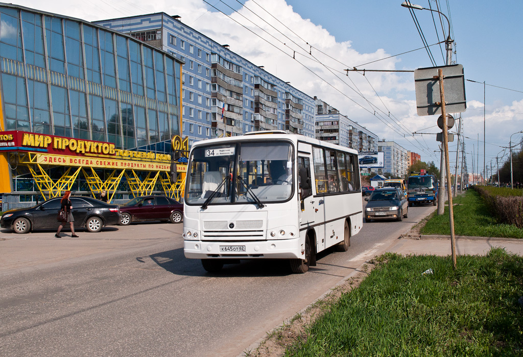 ПАЗ-320402 на ул.Новоселов, рязань